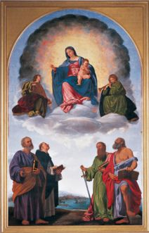 SAVOLDO, Giovanni Girolamo Pala di Pesaro